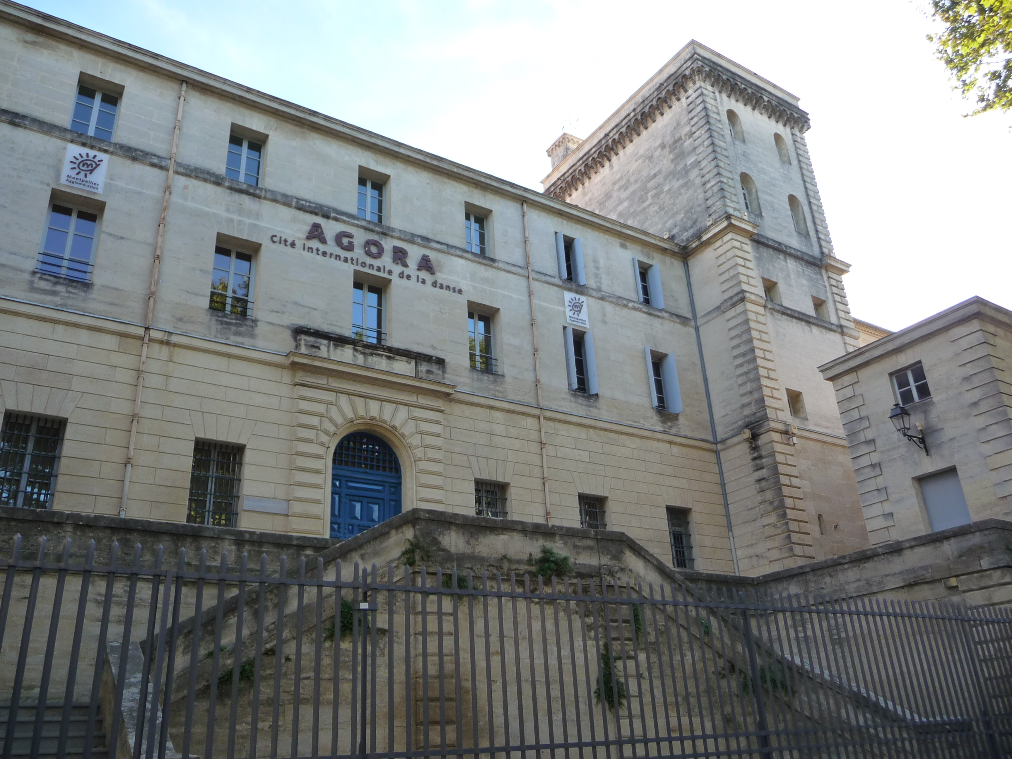 Antic Convent de les Ursulines de Montpeller .